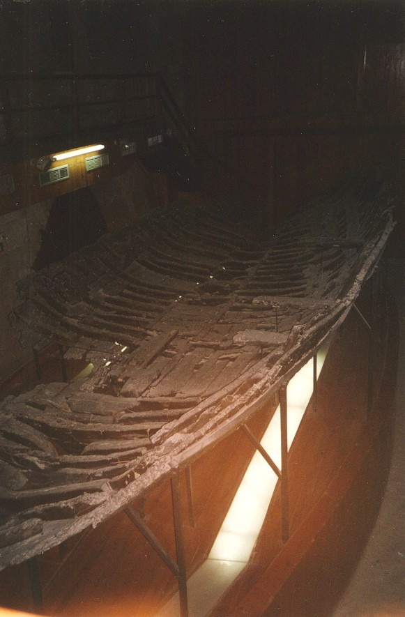 Museo del Castillo de Kyrenia. Barco antiguo hallado frente a Kyrenia. Imagen tomada por el cargador.